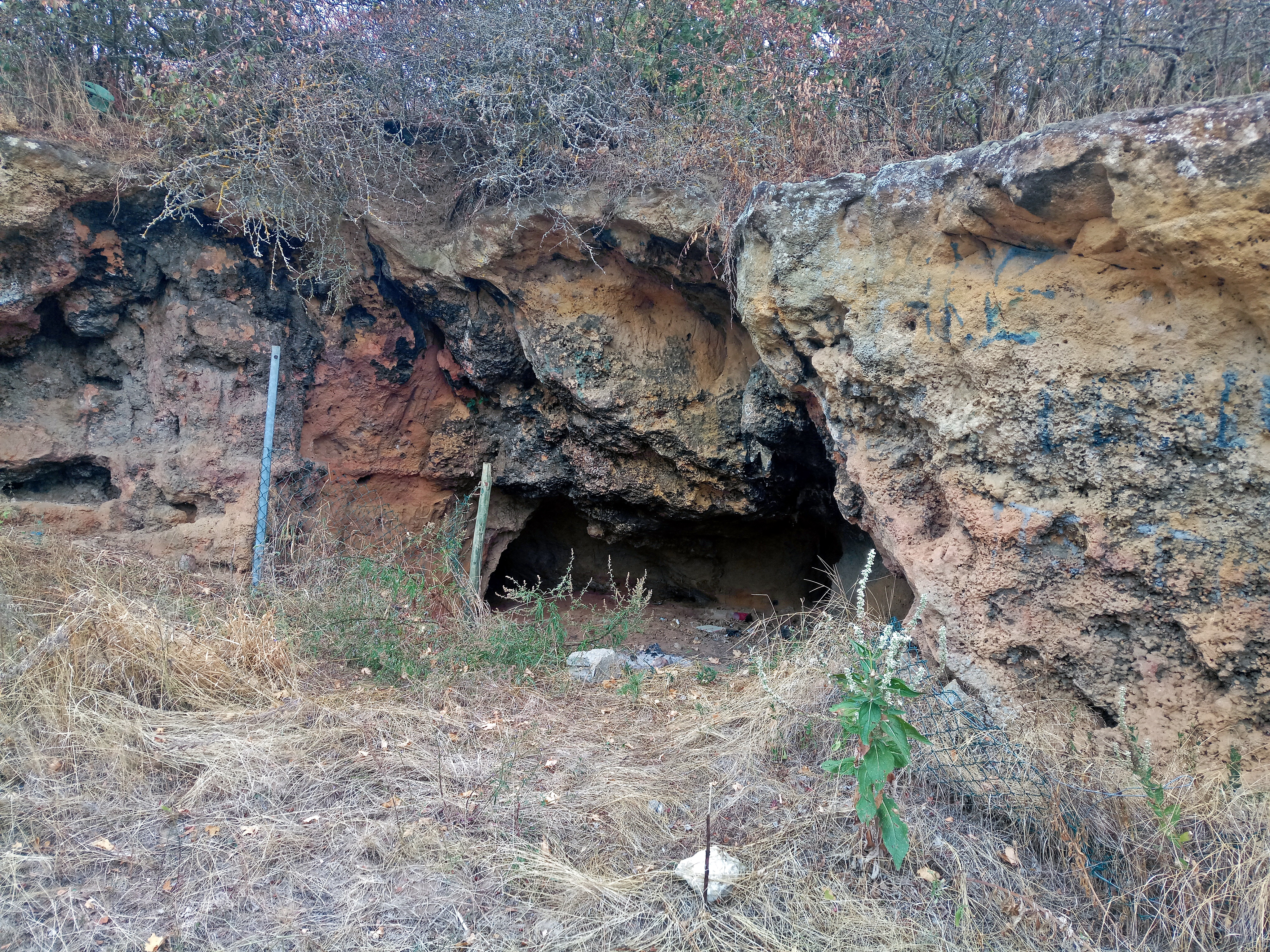 Sausenheim Fuchshöhle